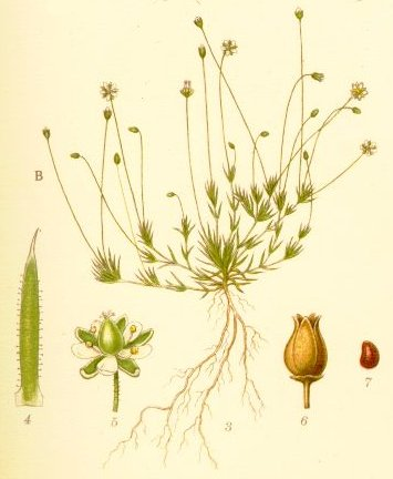 Sagina subulata (Sw.) C. Presl Original Description Sylnarv, Sagina subulata Presl.